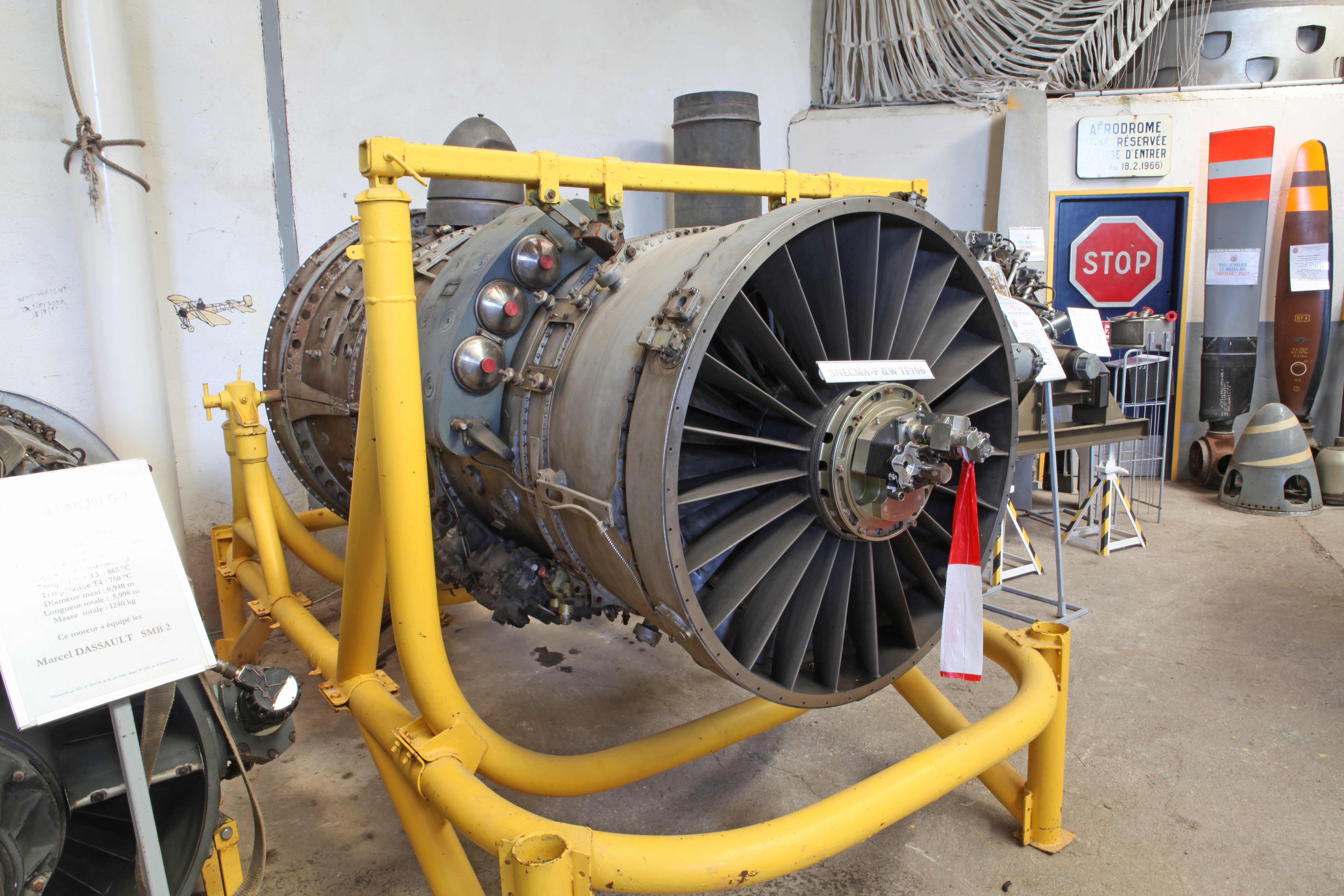 at Ailes Anciennes Armorique Vannes airport